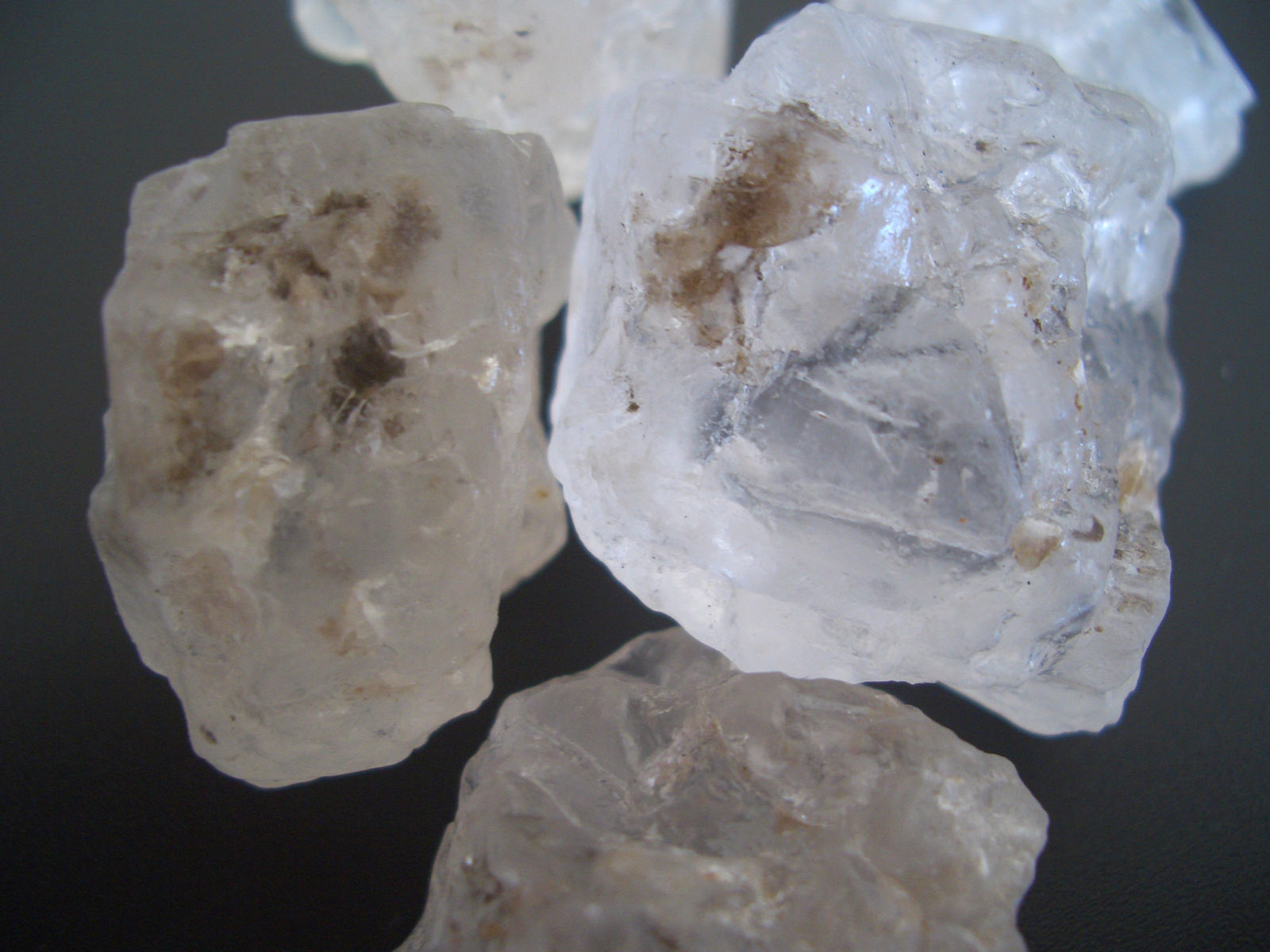 Lake salt from Jilantai Salt Lake (Inner Mongolia, China).